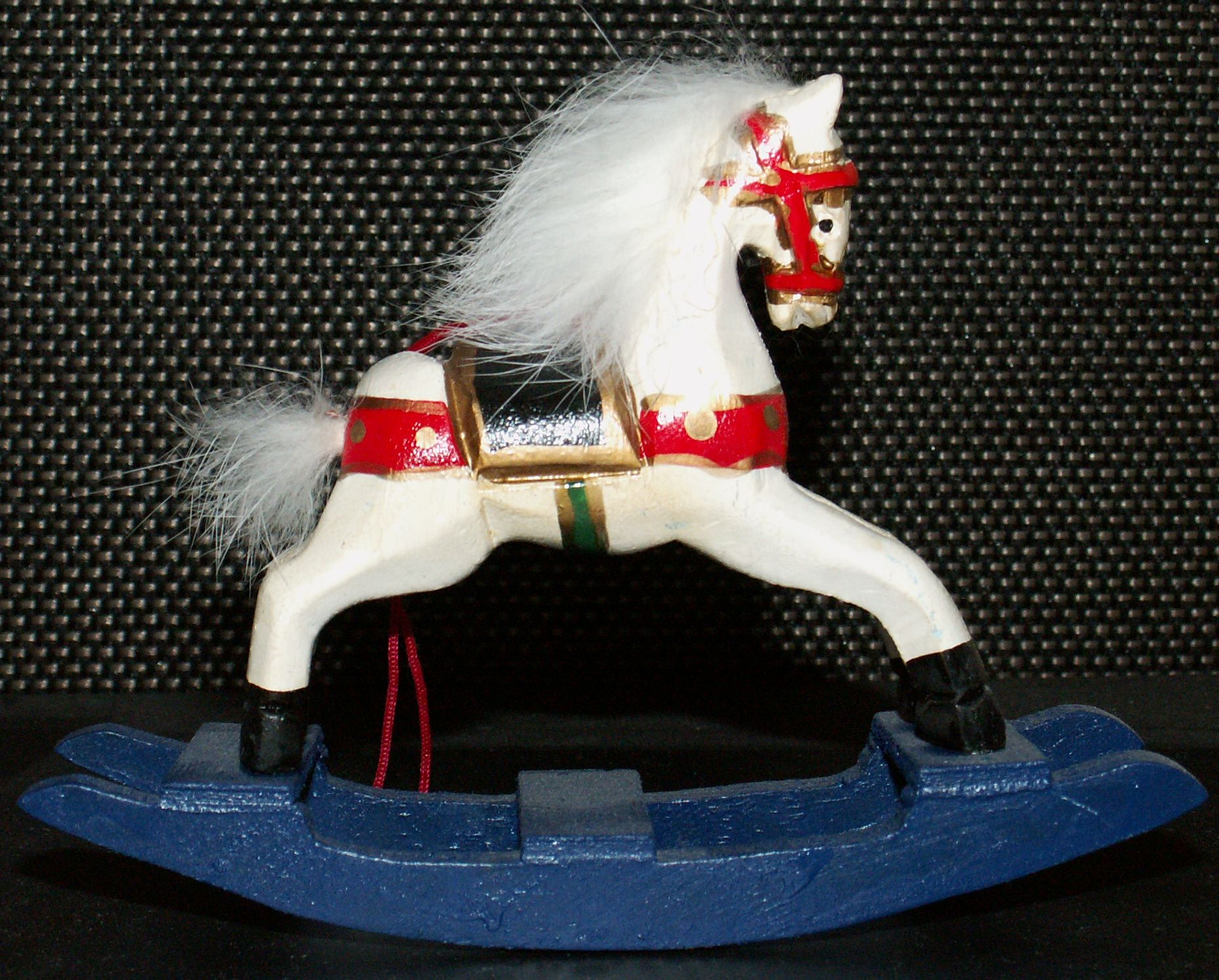 Modell eines Schaukelpferdes, Weihnachtsdeko, für den Artikel Schaukelpferd